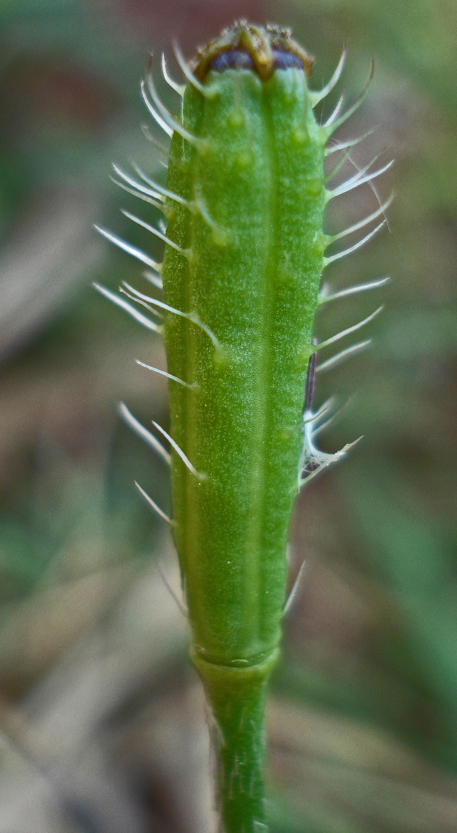 Fruchtkapsel des Sandmohns (Papaver argemone), Unterfranken, Deutschland